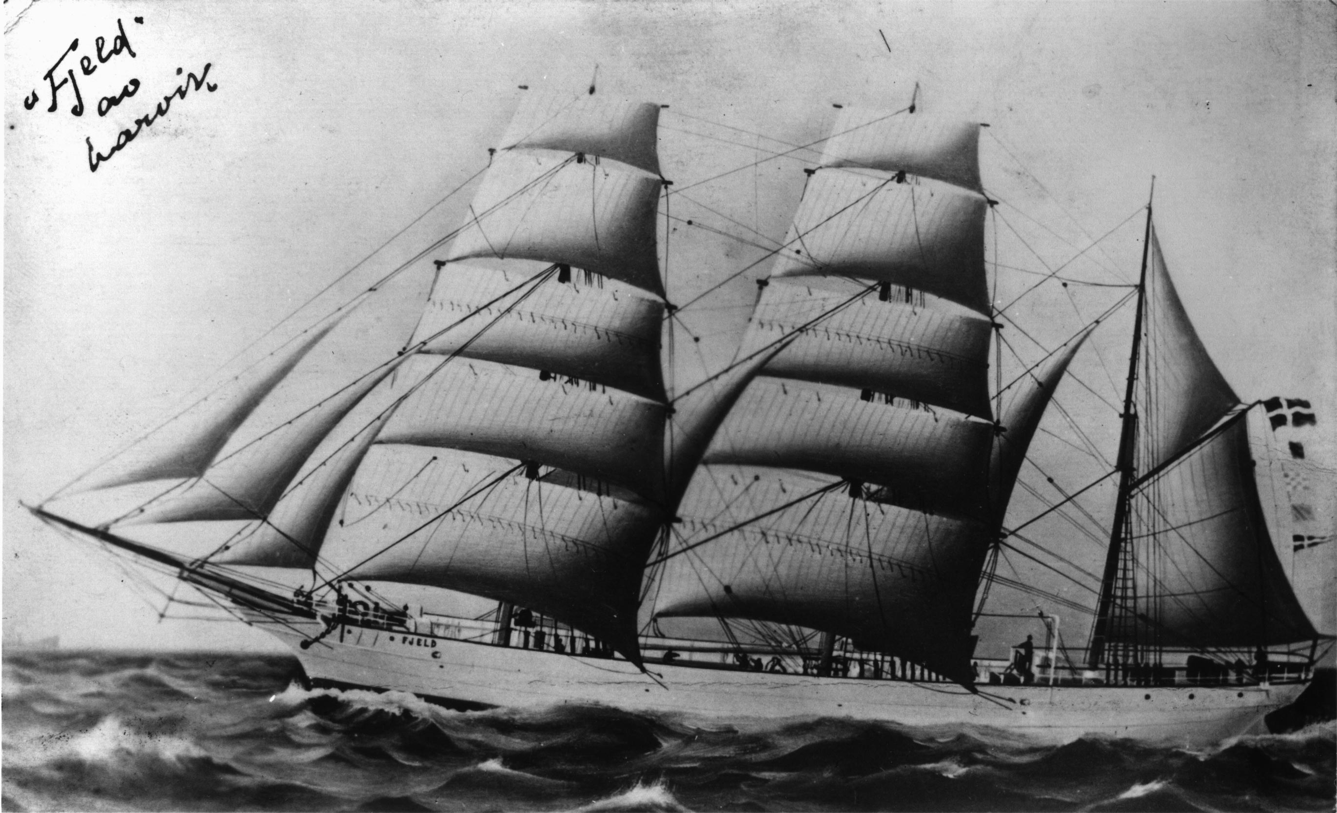 Fjeld (skip)